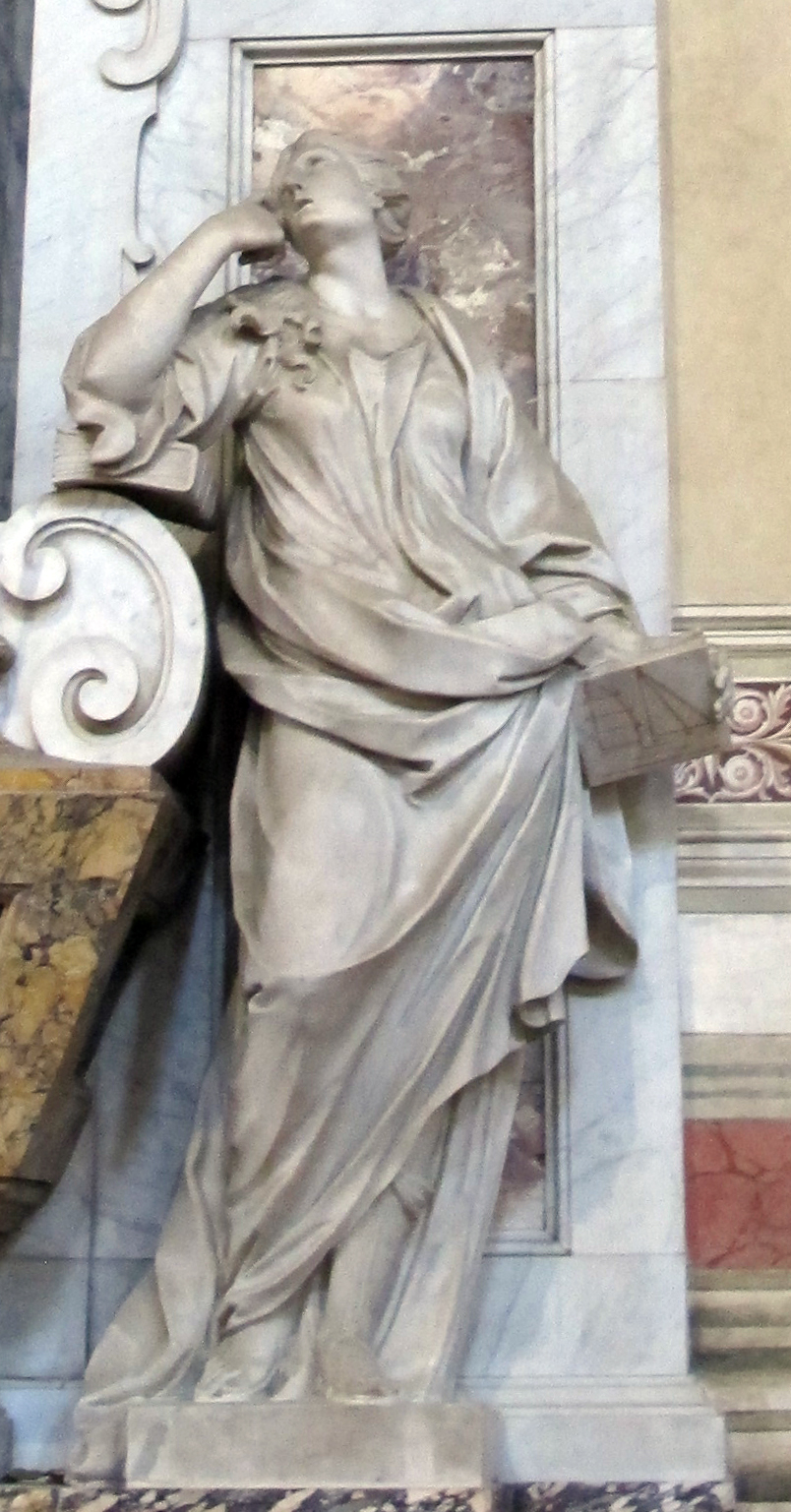 Tomba di galileo, geometria di girolamo ticciati